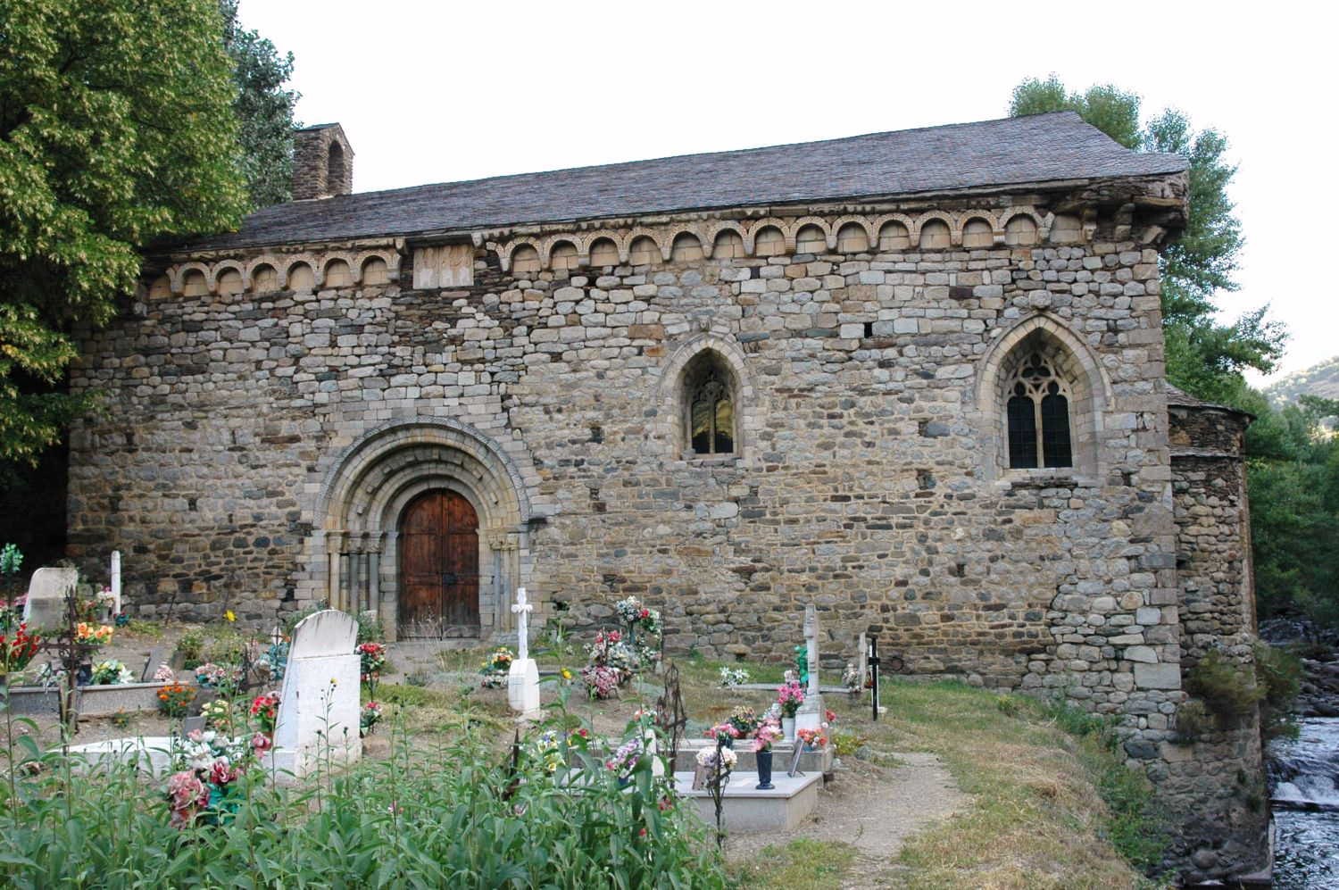 Sant Joan d'Isil